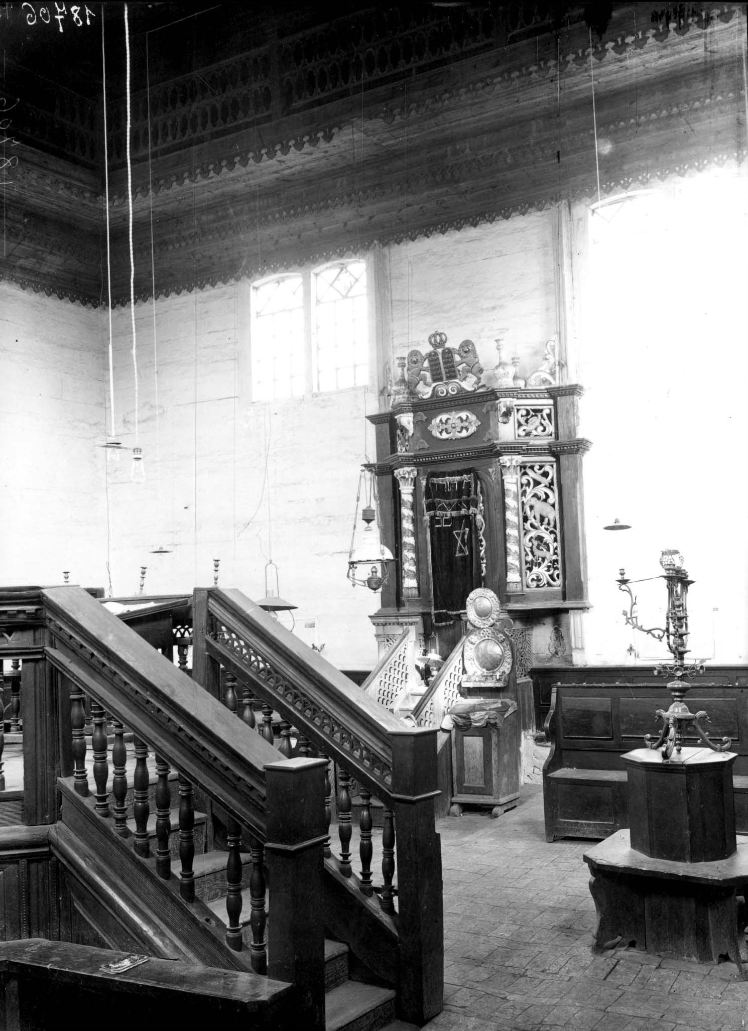 Беларуская (тарашкевіца): Пескі (Pieski). Сынагога